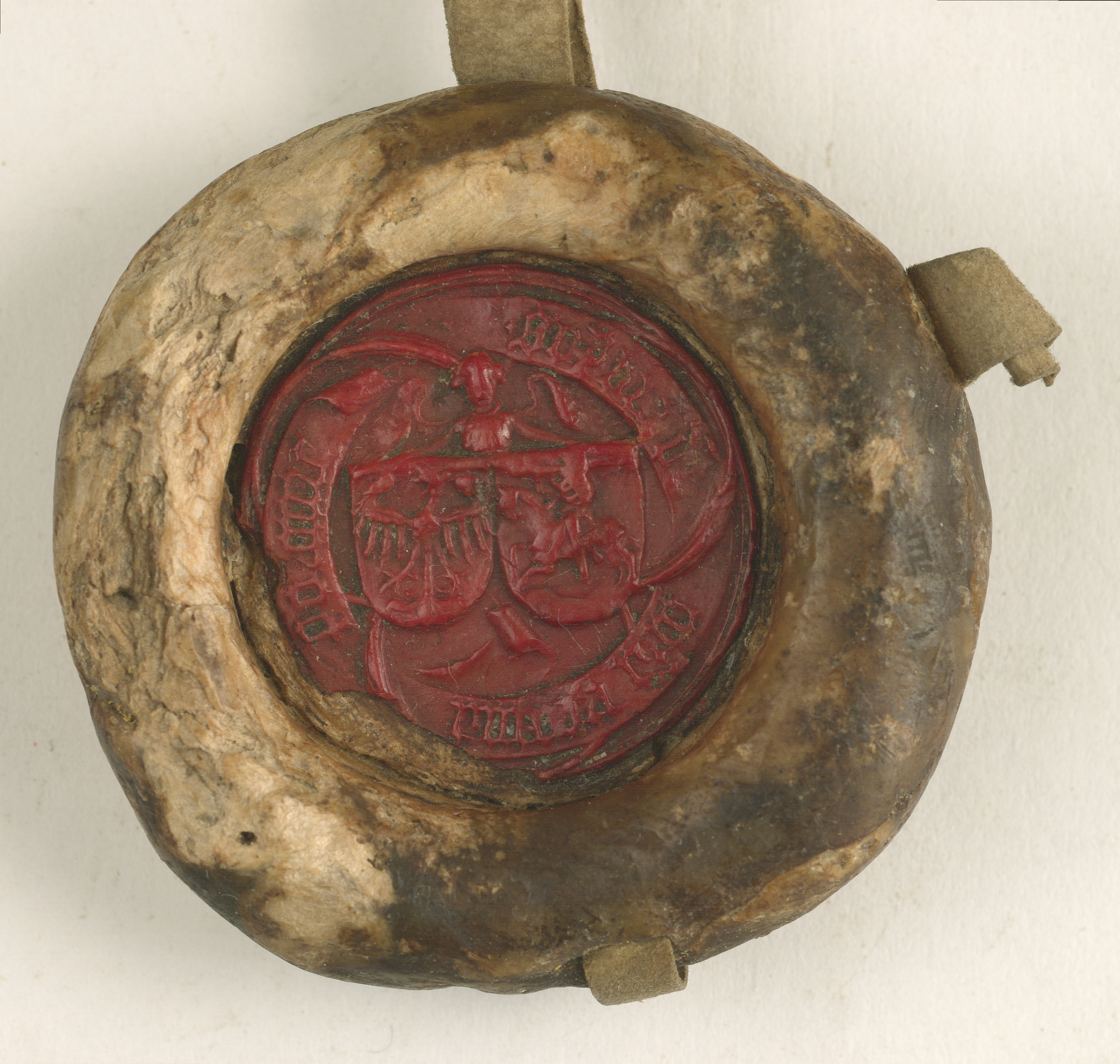 Pieczęć na pasku odciśnięta w czerwonym wosku. W polu pieczęci równolegle dwie tarcze trzymane przez Anioła (jego popiersie nad nimi). W prawej (herladycznie) - Orzeł, w lewej - Pogoń. Jeździec w Pogoni ma prawdopodobnie tarczę z krzyżem jagiellońskim. Napis w otoku na wstęgach: legenda ◦ SOPHIA D'[...]